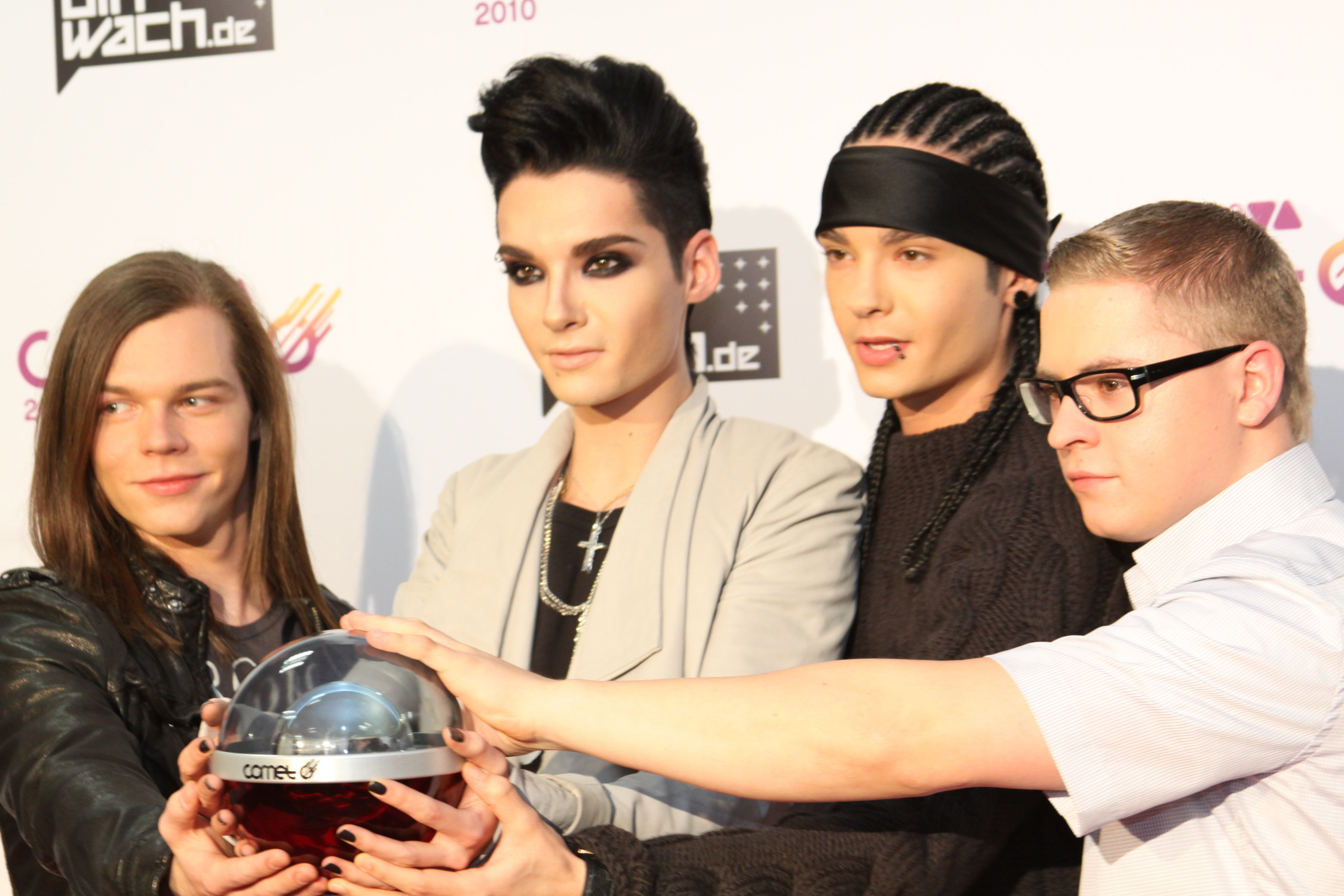 Tokio Hotel bei der Preisverleihung des Comet am 21. Mai 2010 in Oberhausen. Von links nach rechts: Georg Listing, Bill und Tom Kaulitz, Gustav Schäfer